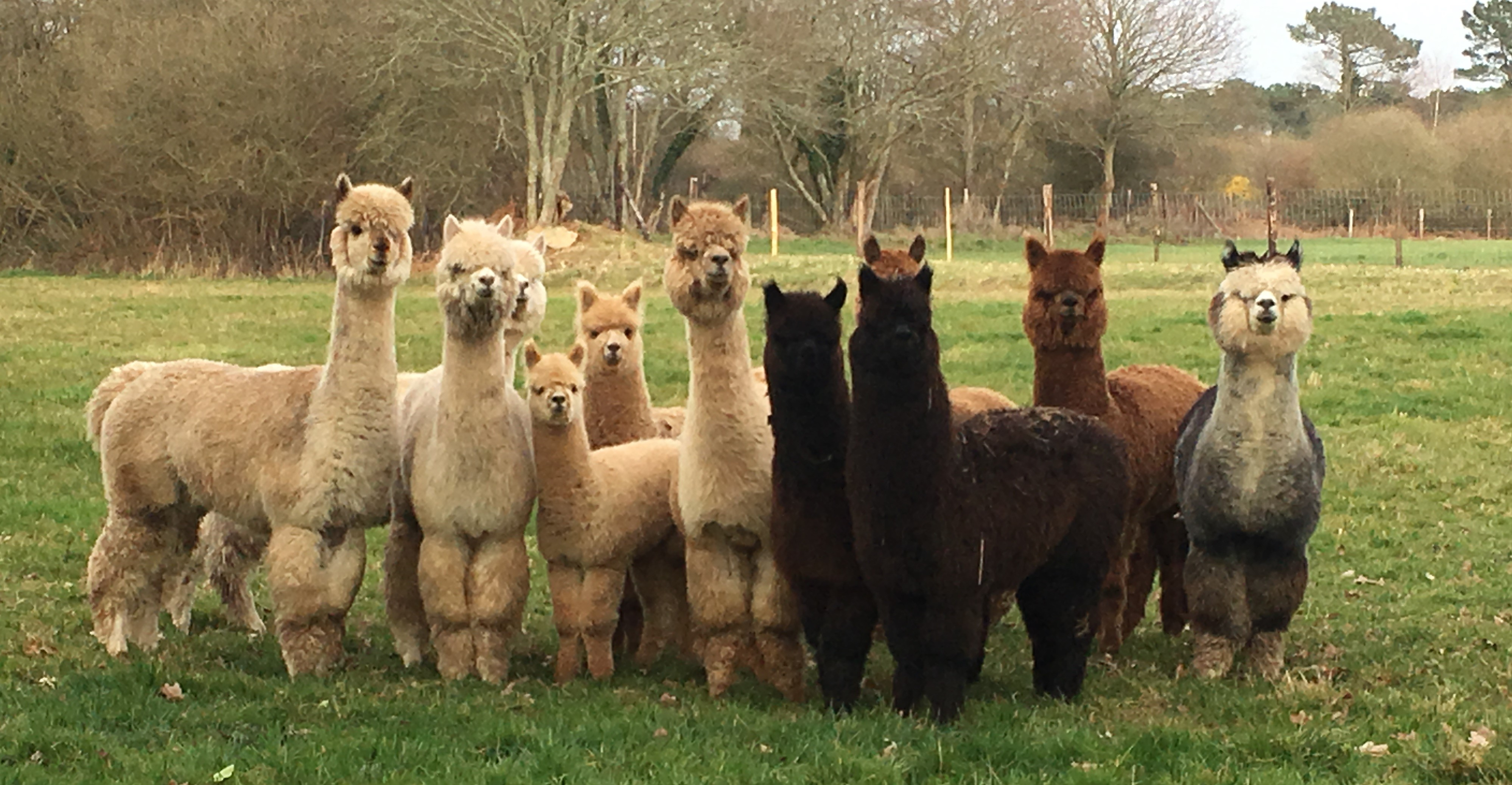 Notre troupeau d'Alpagas